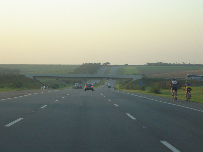 Rodovia dos Bandeirantes em Santa Bárbara d'Oeste/SP